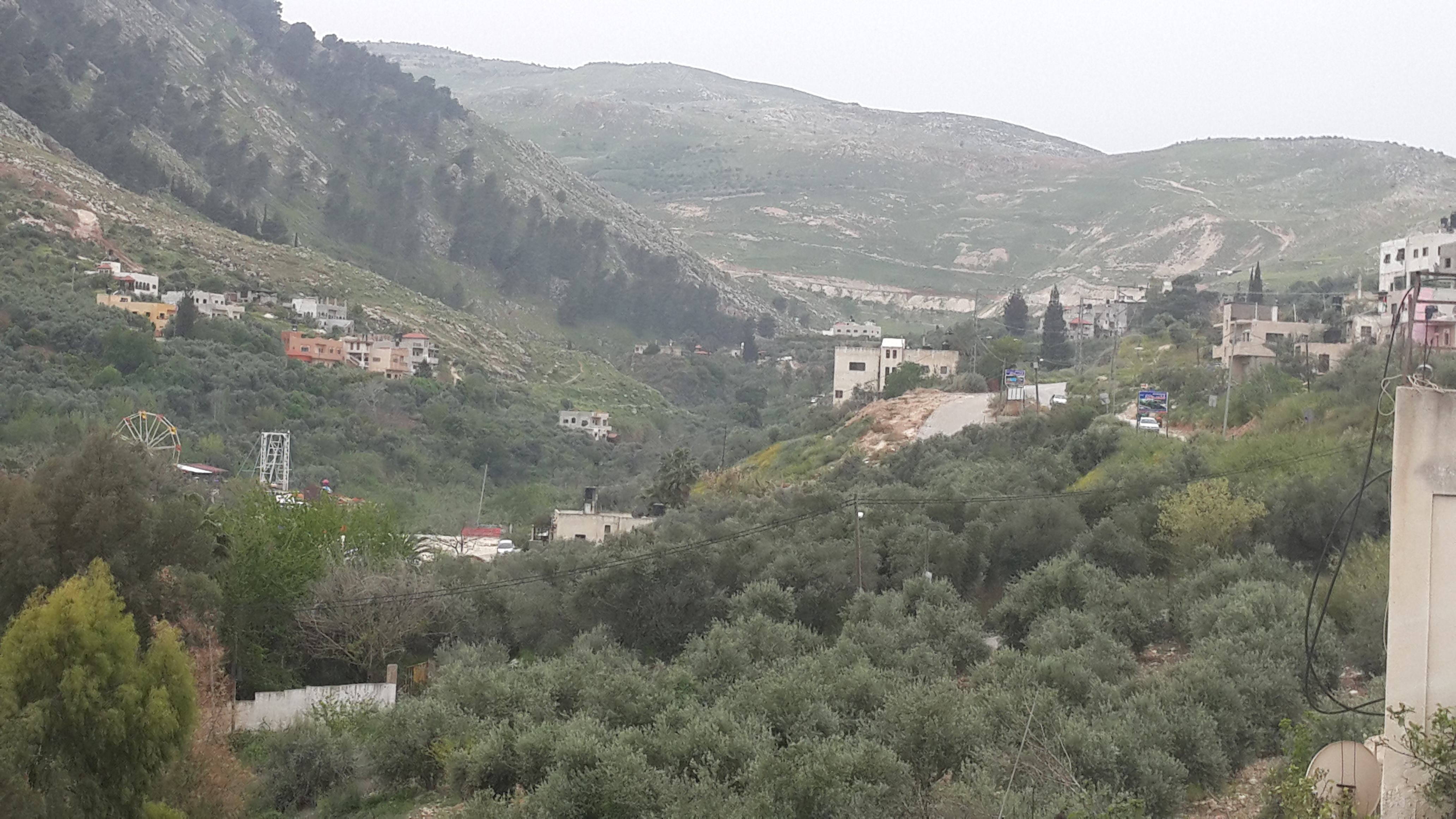 mon village